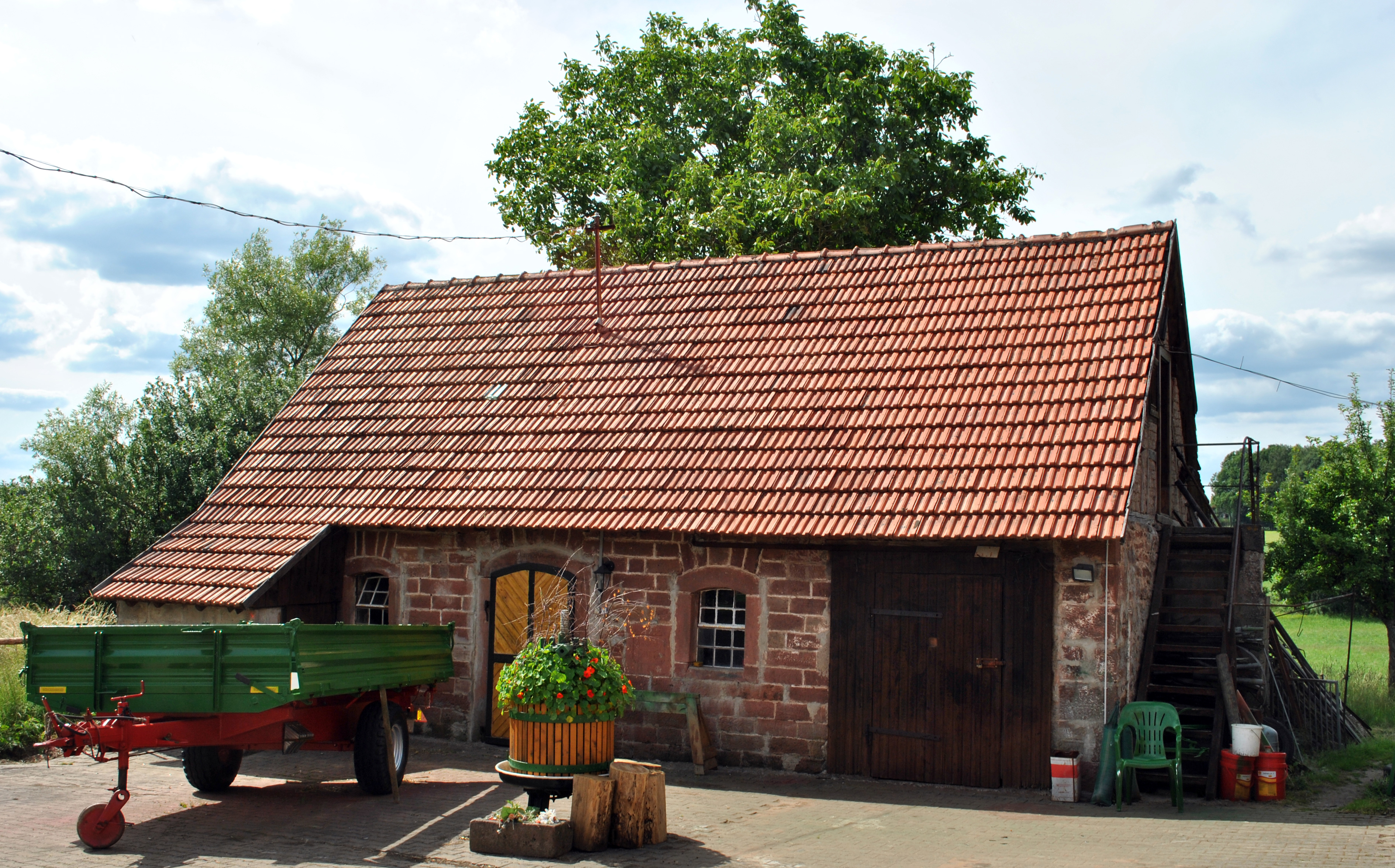 Landwirtschaftliches Nebengebäude in Hesselbach auf der Wiesenstr. 9.